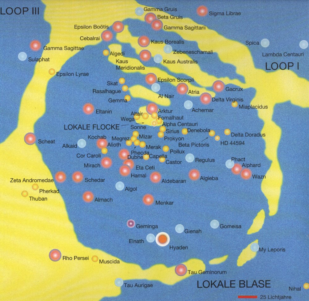 Lokale Blase